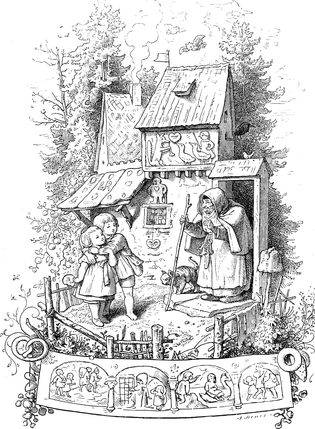 Hänsel und Gretel vor dem Hexenhaus